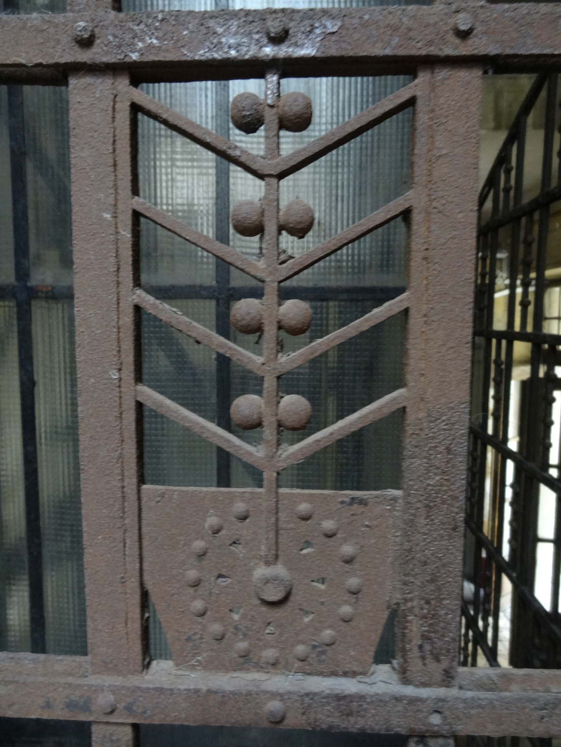 Budapest, Népszínház utca 37. – Korlátdísz 2017